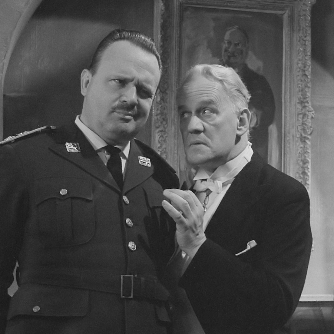 "The great Sebastians" , televisiespel, vlnr. Guus Verstraete , Cruys Voorbergh en Mieke Verstraete 4 december 1960